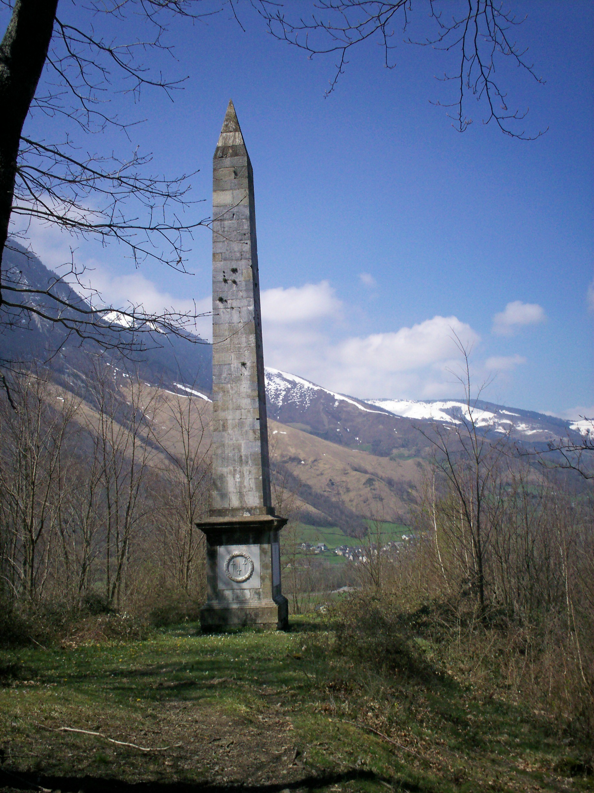 Fotografia personala de l'utilizaire AdeFC, libra de dret